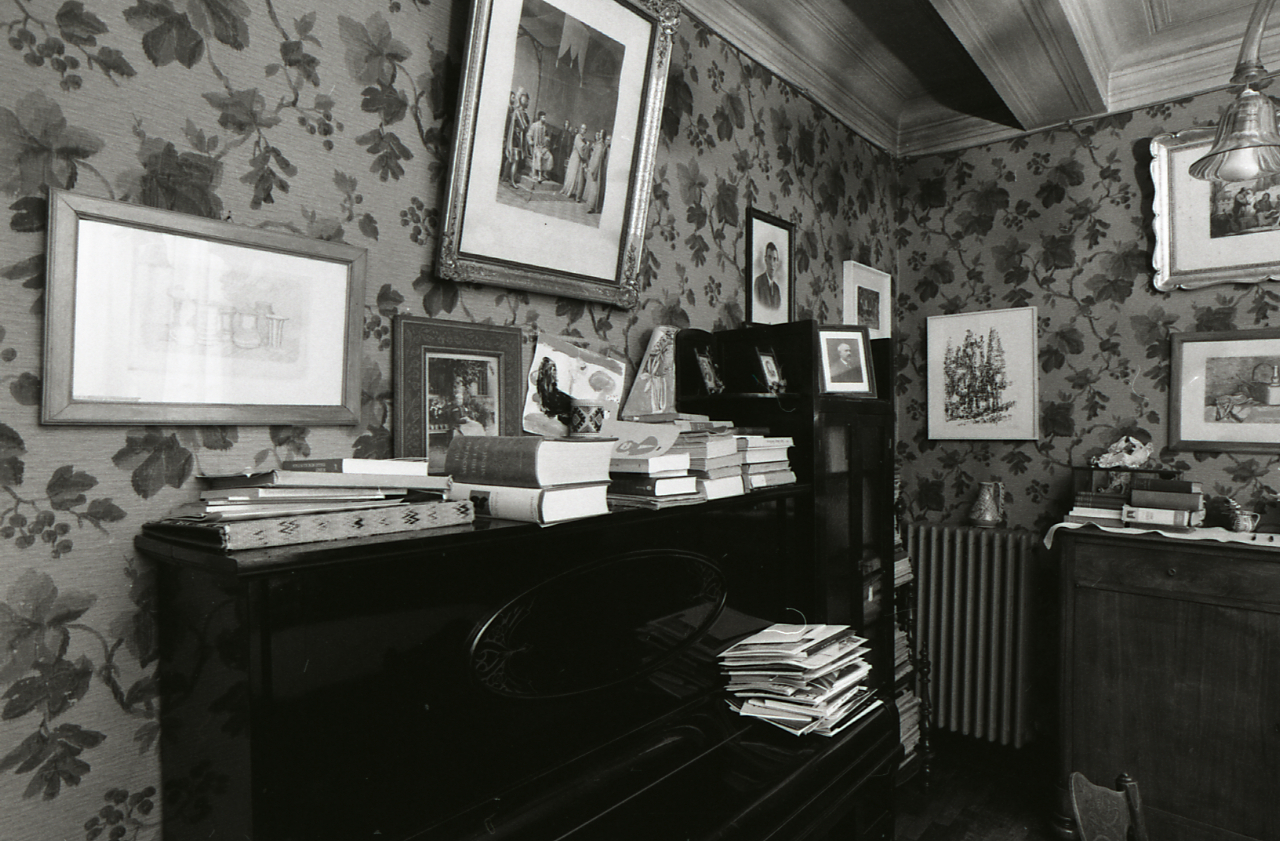 Servizio fotografico : Bologna, 1981 / Paolo Monti. - Strisce: 7, Fotogrammi complessivi: 36 : Negativo b/n, gelatina bromuro d'argento/ pellicola ; 35 mm. - ((Sul portanegativi: N[I]K[MA]T FP4. - Fonte: Agenda di Paolo Monti: Nikon Leika 3001-/ Monti 1978 (1978-1982), presso Archivio Paolo Monti